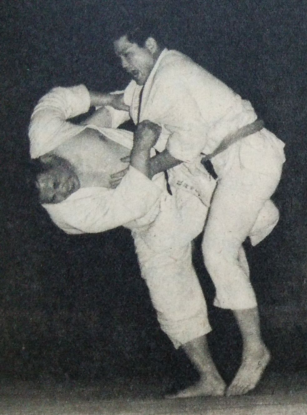 1953年度全日本柔道選手権大会決勝戦での吉松義彦（左）と伊藤秀雄（右）